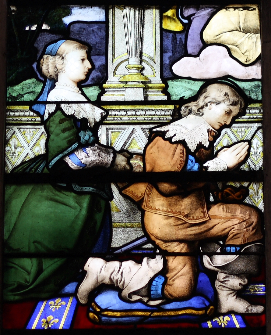 Bleiglasfenster (Ausschnitt) in der katholischen Pfarrkirche Saint-Martin (Collégiale Saint-Martin) in Montmorency, Darstellung: Armand de Bourbon und Anne Geneviève de Bourbon-Condé